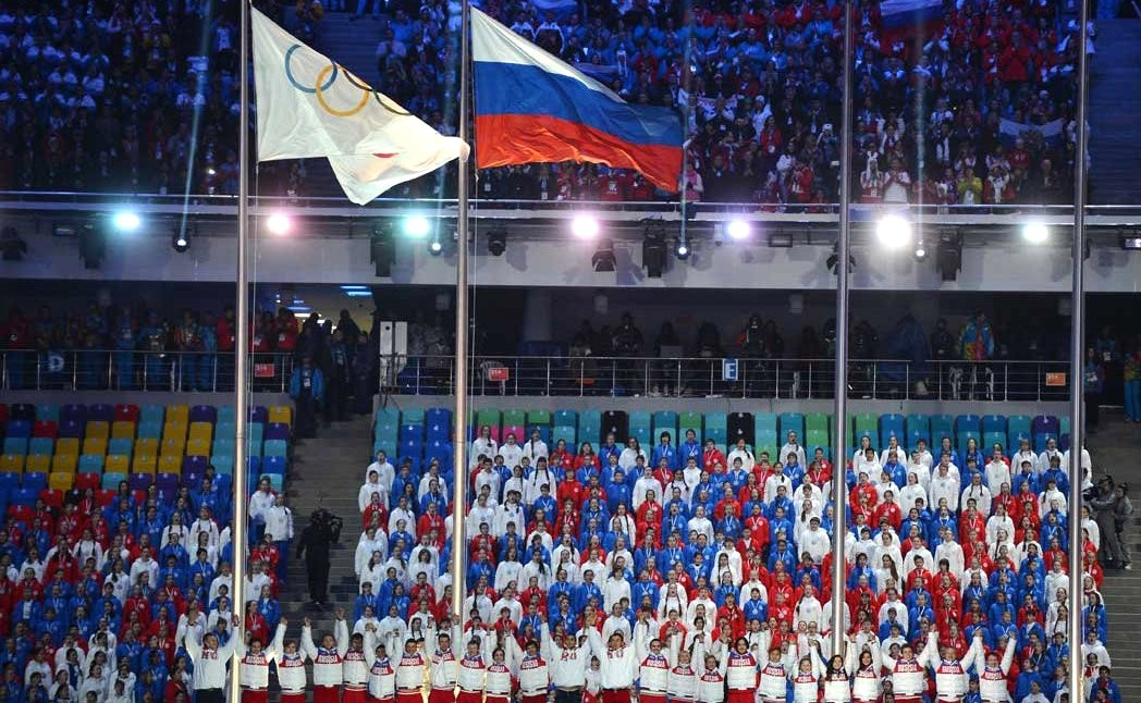 Олимпийский и российский флаг на церемонии закрытия Олимпийских игр 2014